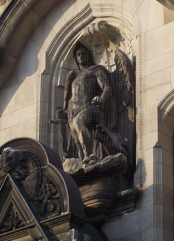 Fassadenfigur über dem Hauptportal der Michaeliskirche in Leipzig